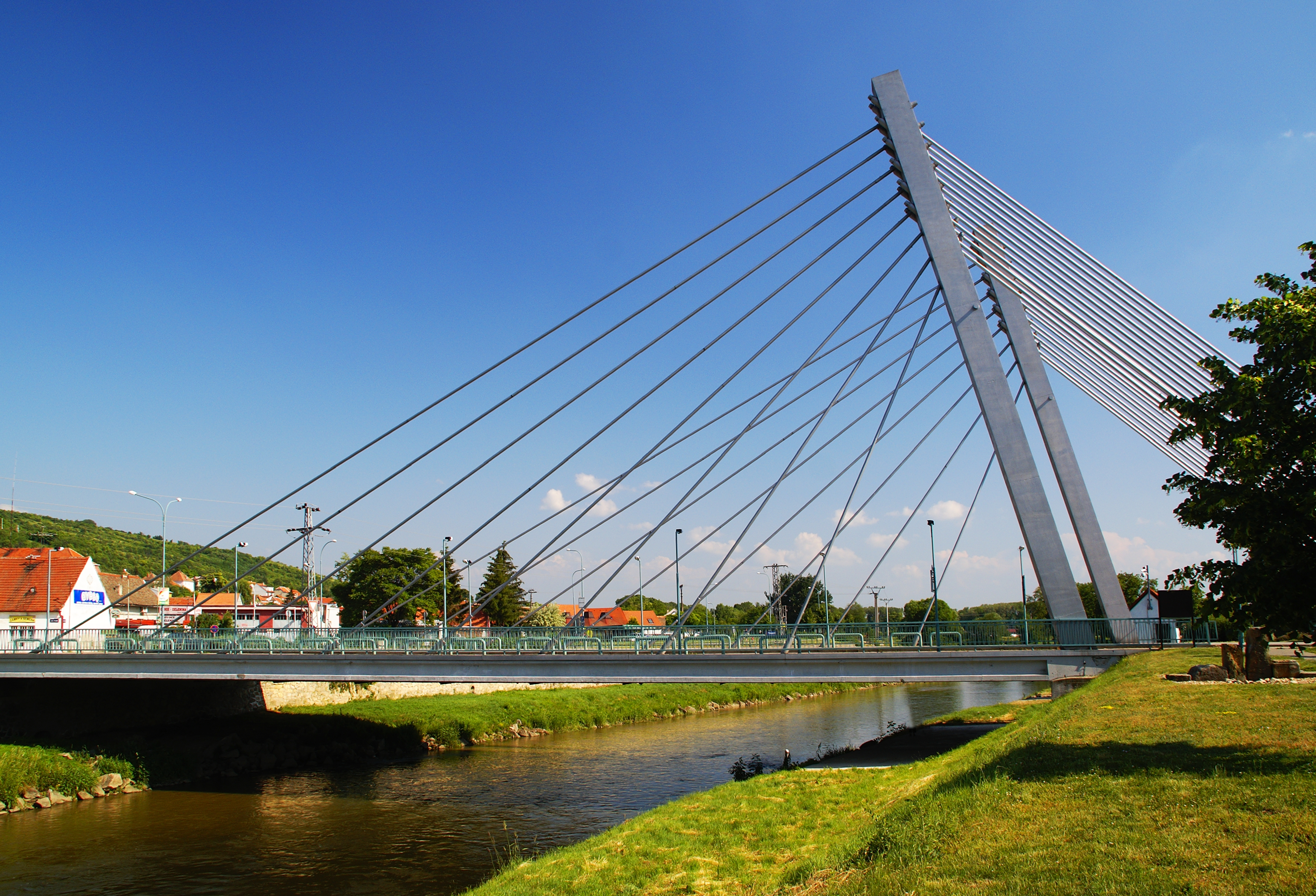 Lanový most v Židlochovicích.